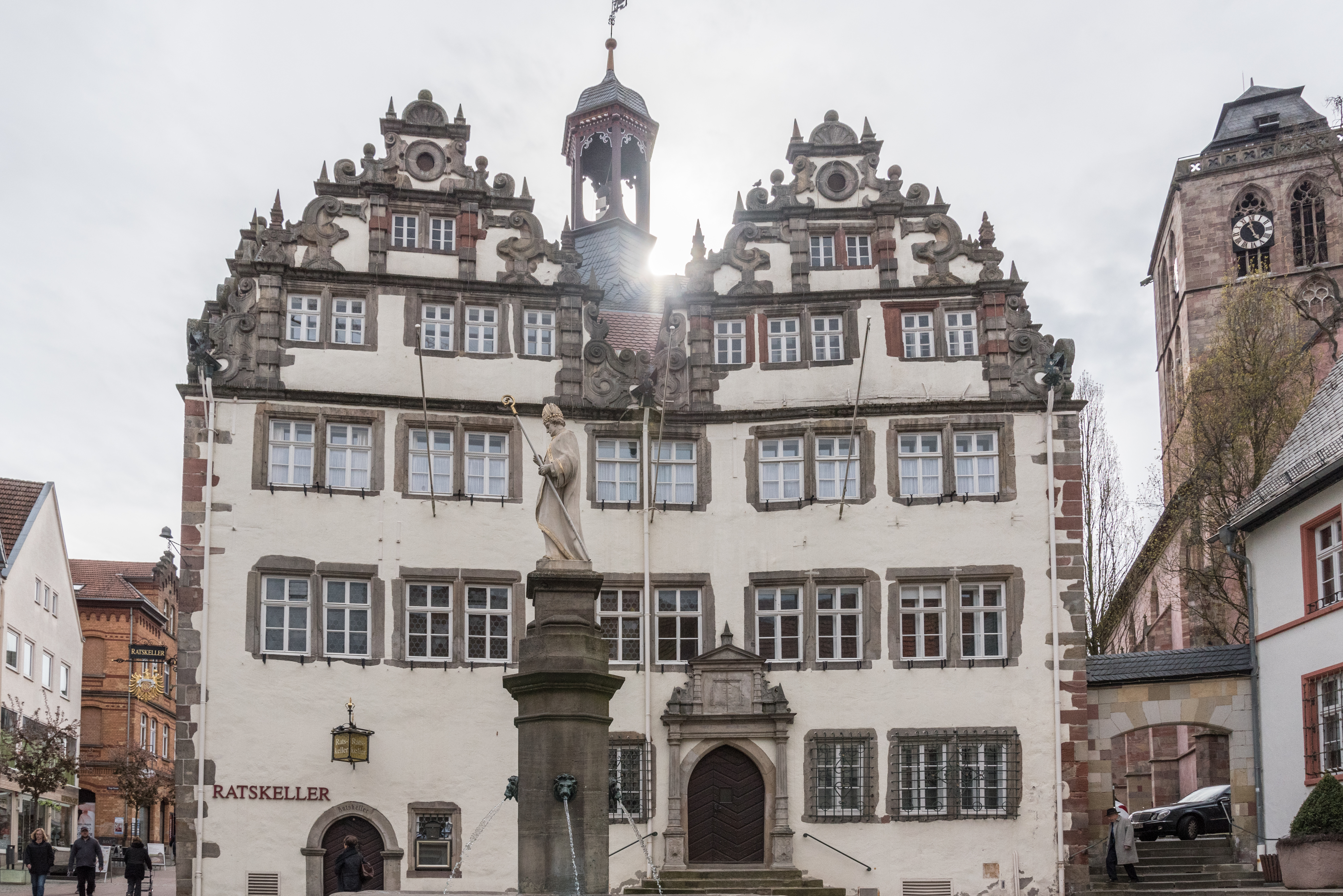 Bad Hersfeld, Weinstraße 16, Rathaus